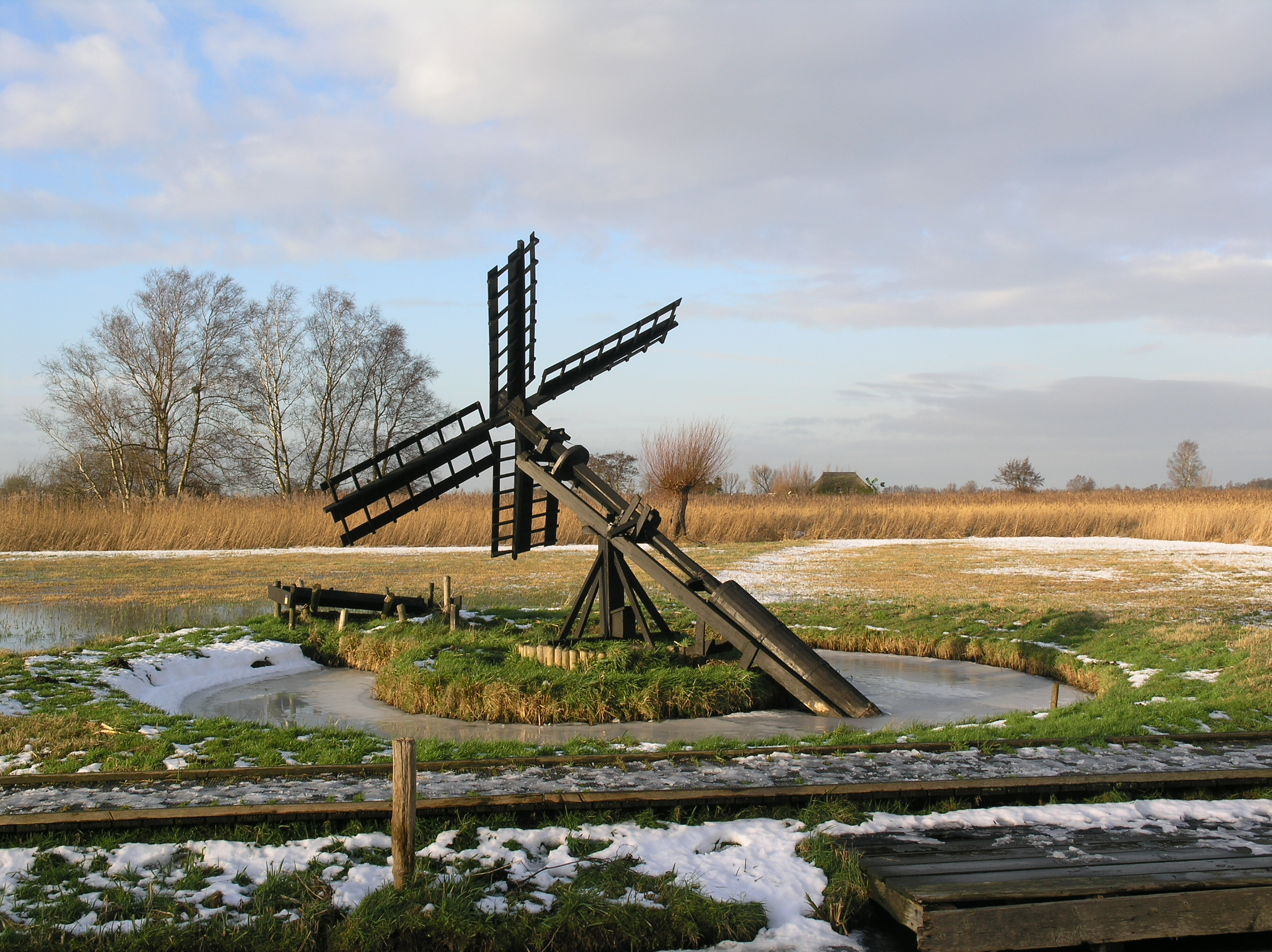 Tjasker De Foeke in Sint Jansklooster